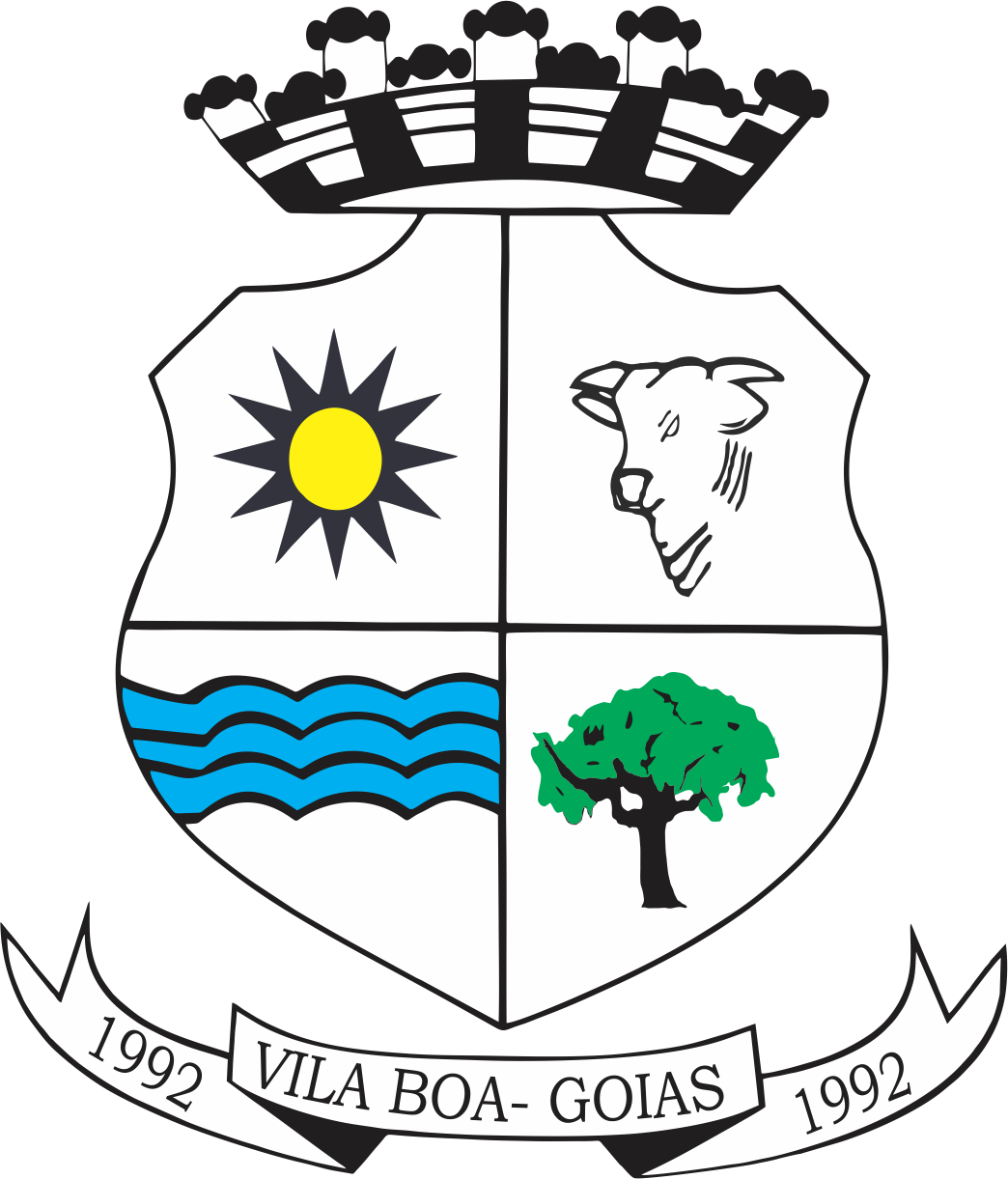 Imagem que representa o brasão do município